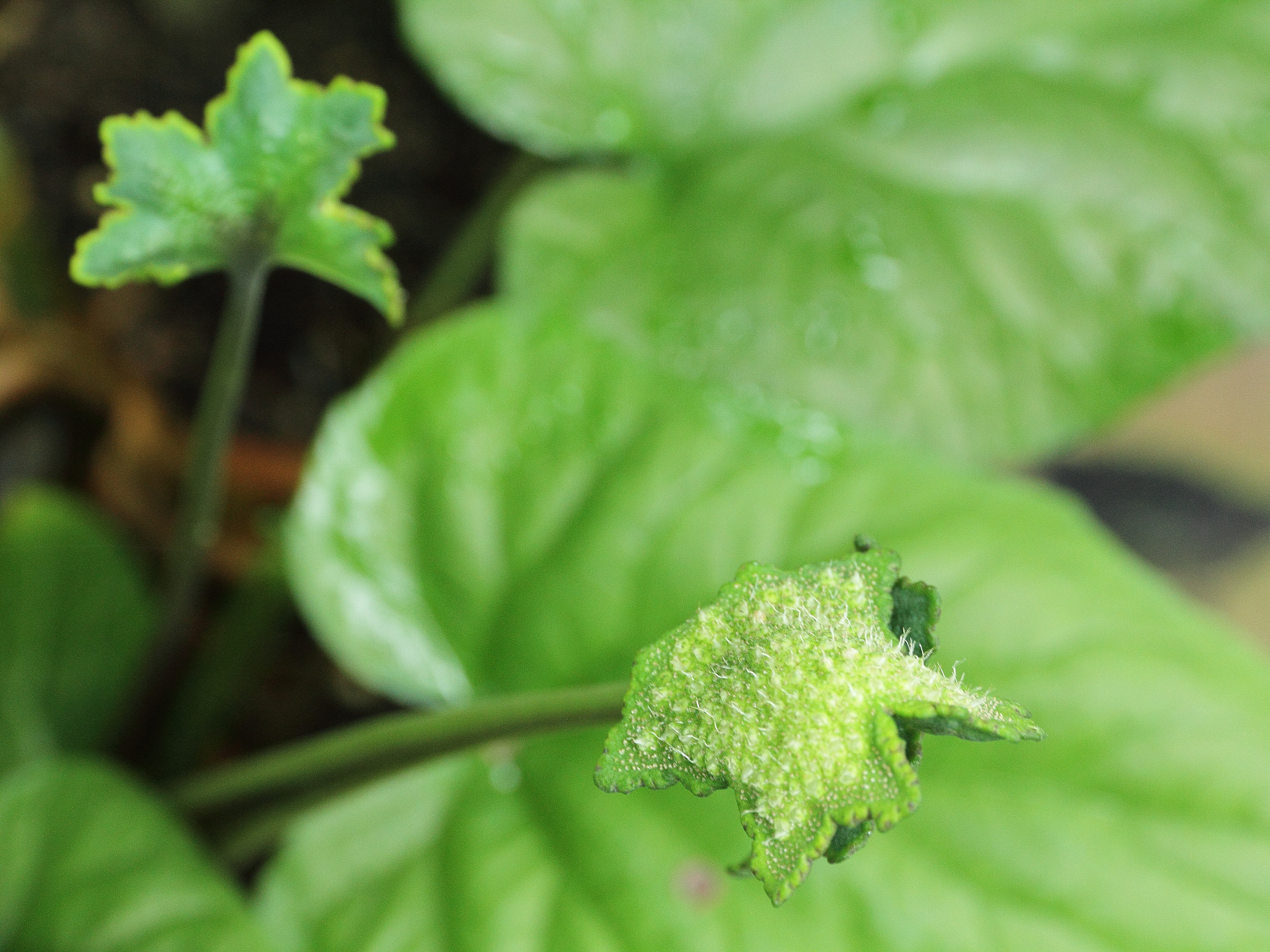 Dorstenia arifolia i Bergianska trädgården.